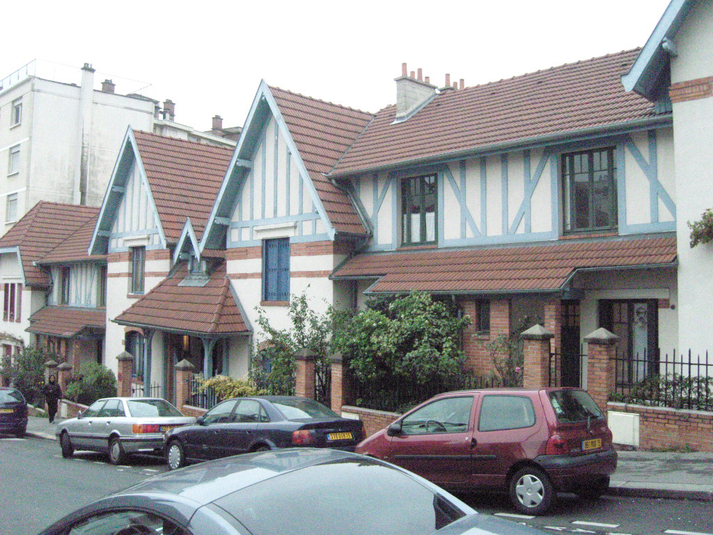 Ensemble de maisons ouvrières à colombage, rue Daviel à Paris 13e, dans le style dit "alsacien".